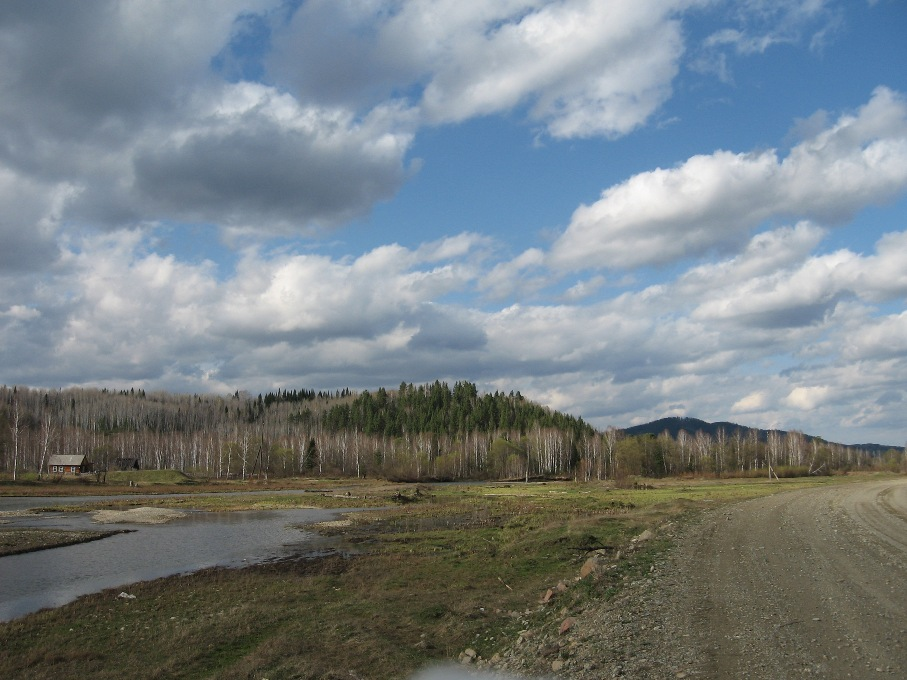 Северная окраина пос. Танзыбей (Красноярский край, Ермаковский р-н): Китаева гора и р. Малый Кебеж